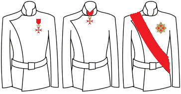 Modo di indossare le decorazioni dell'Ordine di Santo Stefano Papa e Martire (Granducato di Toscana)